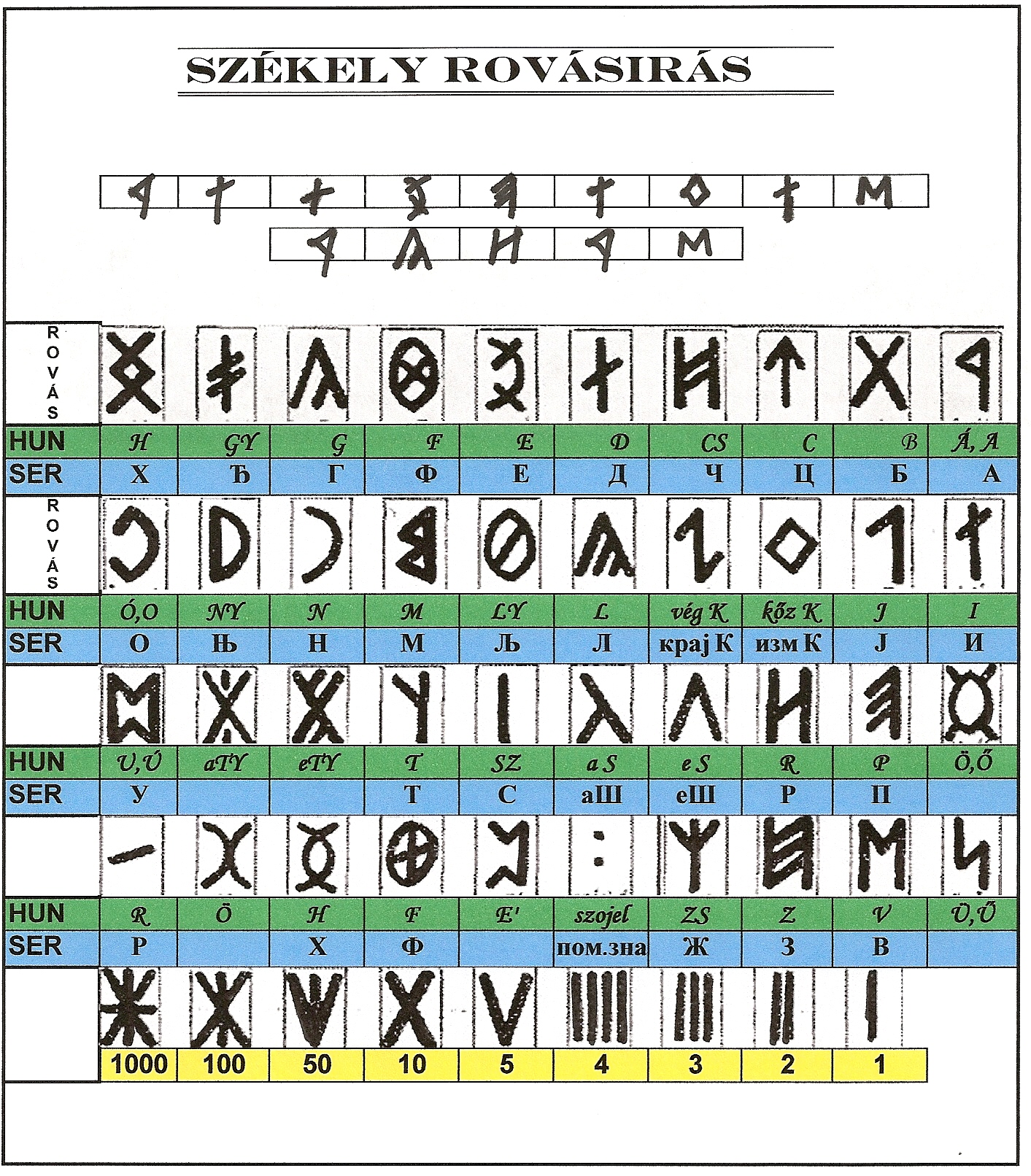 Laslo Varga